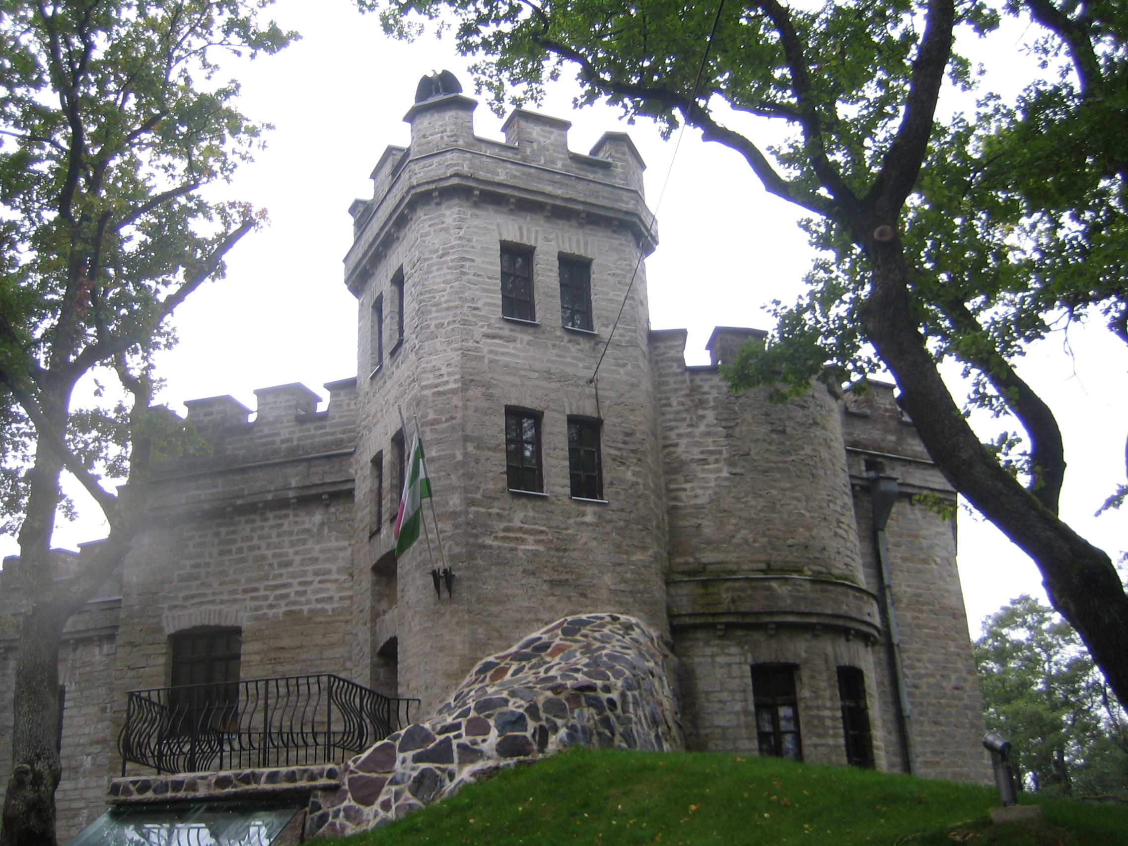 Hohenhaupti loss (nn. Glehni loss), 1886. a.